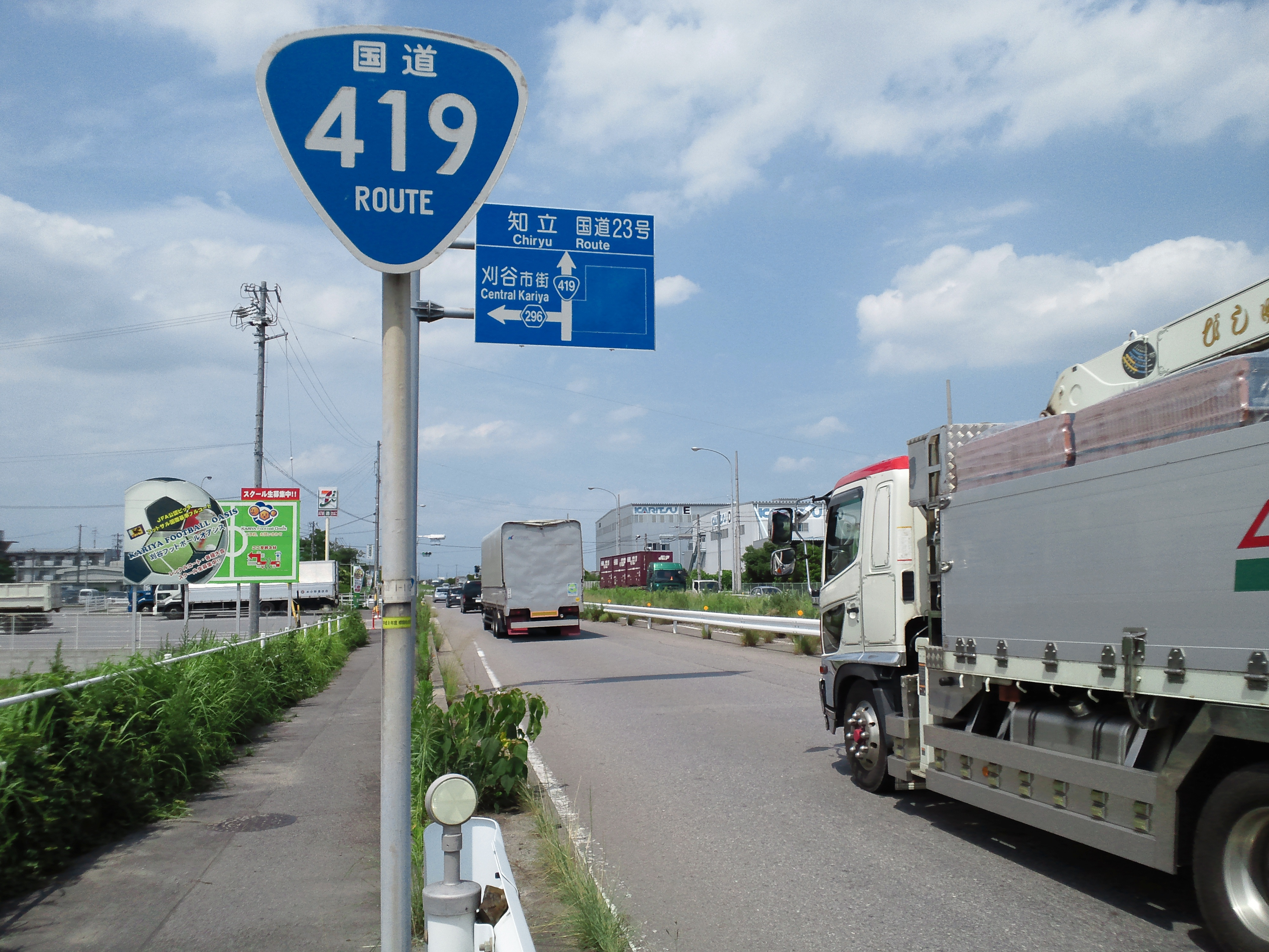 刈谷市内の国道419号。